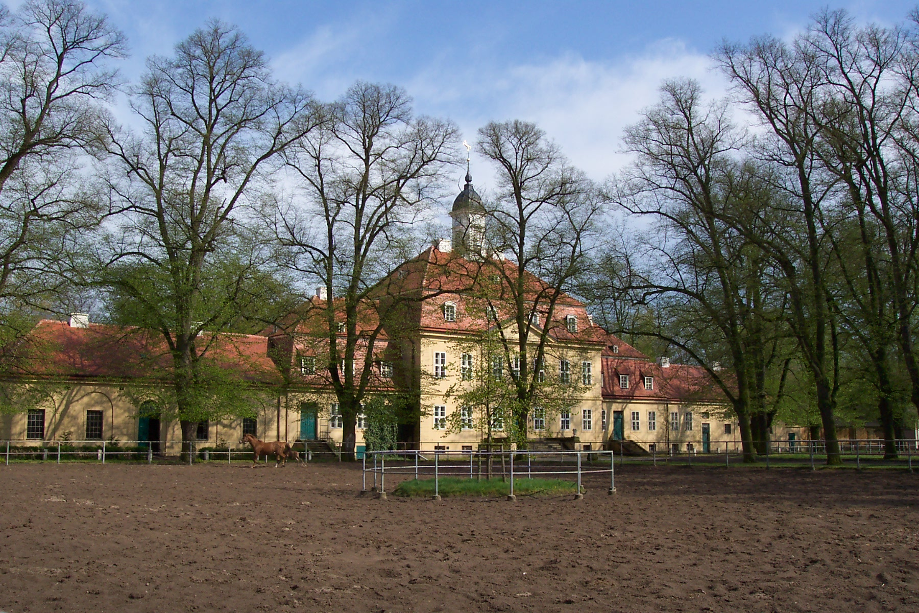 Brandenburgisches Haupt- und Landgestüt Neustadt/Dosse